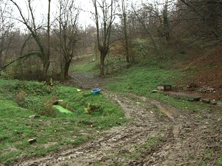 Paunska banja